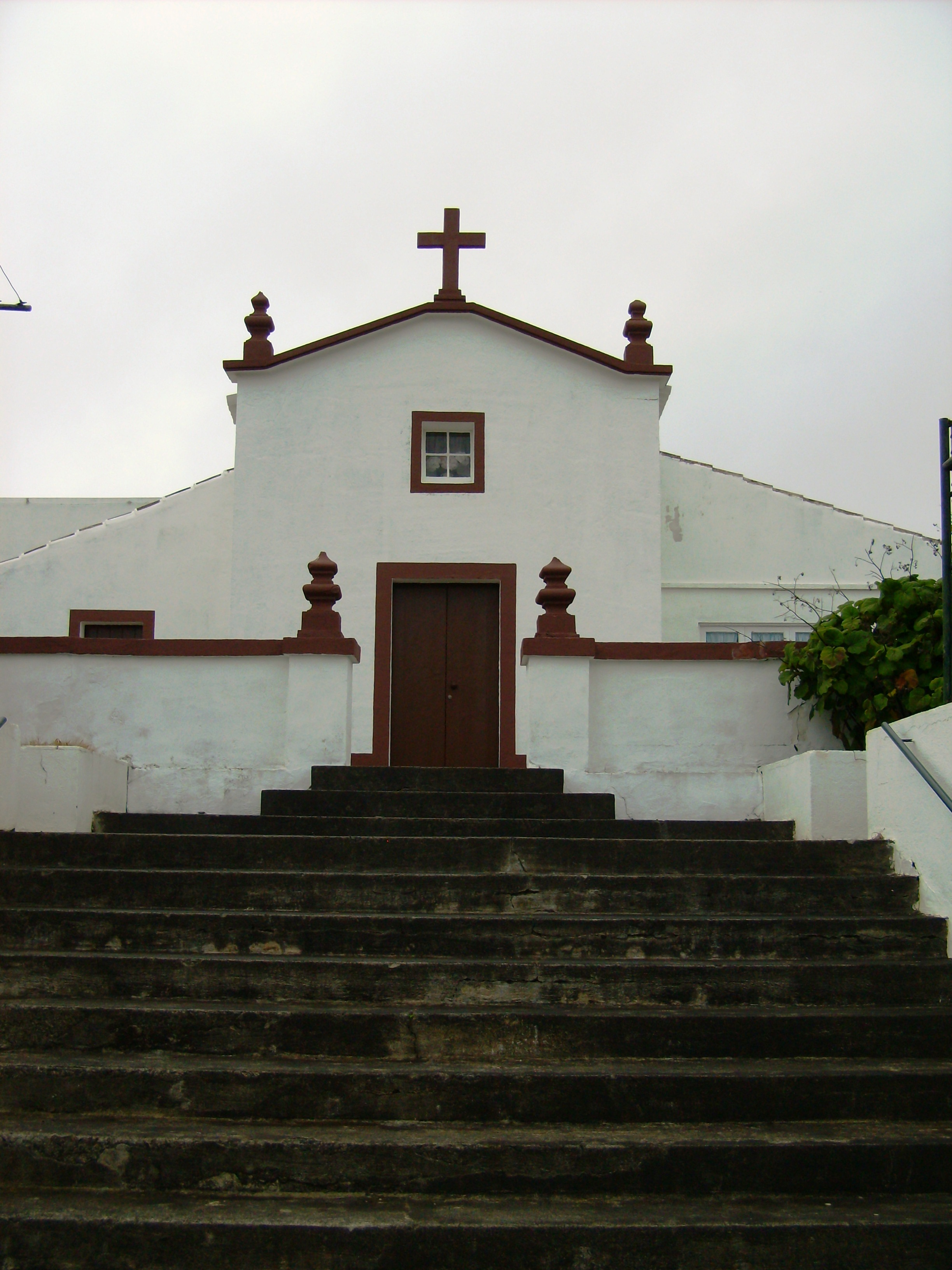 Ermida de Nossa Senhora Mãe de Deus, Ilha de Santa Maria (Açores), Portugal.